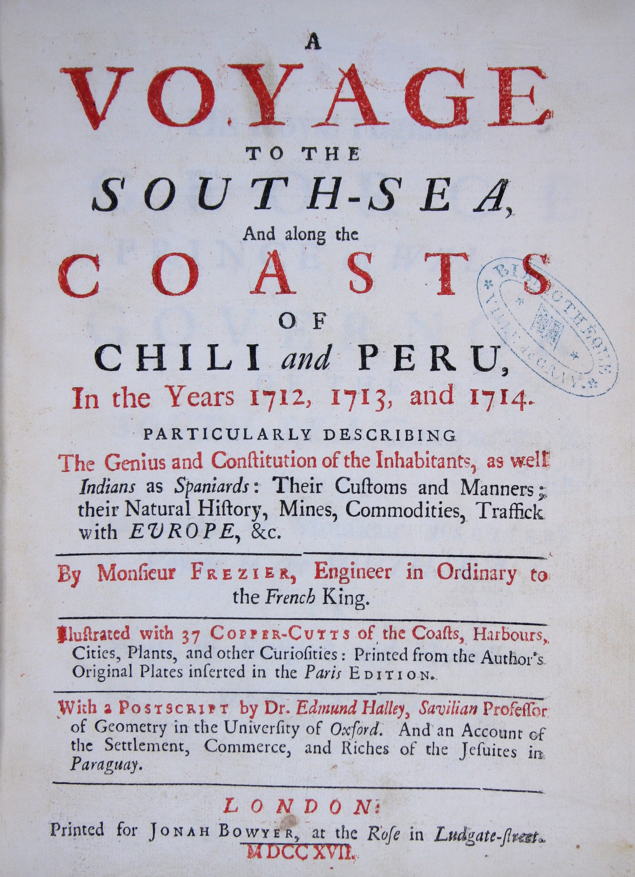 Relation du voyage de la mer du Sud aux côtes du Chili, du Pérou et de Brésil, fait pendant les années 1712, 1713 1714. Ouvrage enrichi de quantité de planches en taille-douce (1717) traduction anglaise publiée la même année (exemplaire de la bibliothèque patrimoniale de Gray (France))